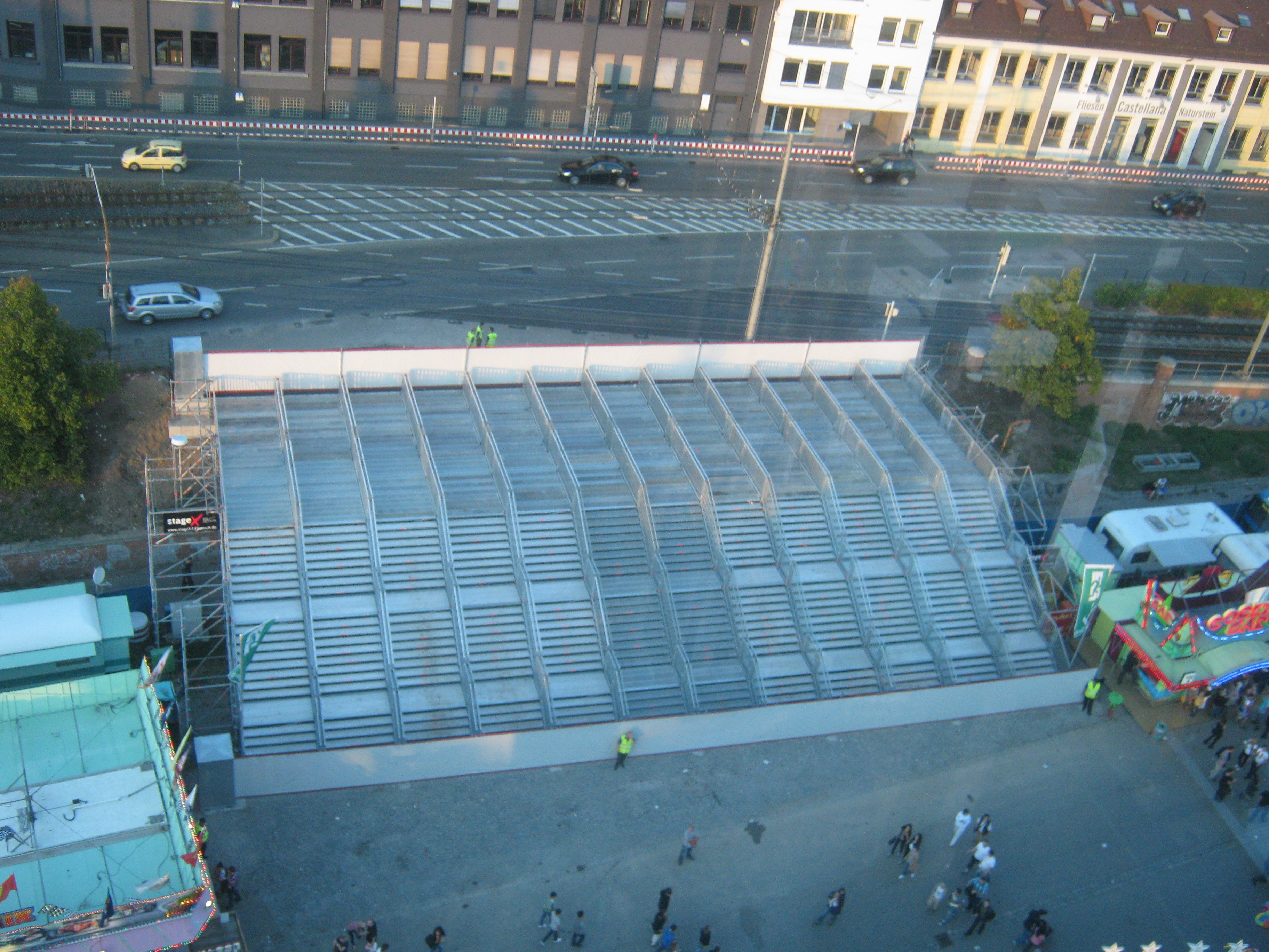 Fluchttreppe, aufgenommen vom 60 Meter Riesenrad